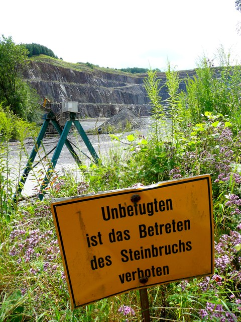 Nentmannsdorf: Steinbruch der ProStein GmbH